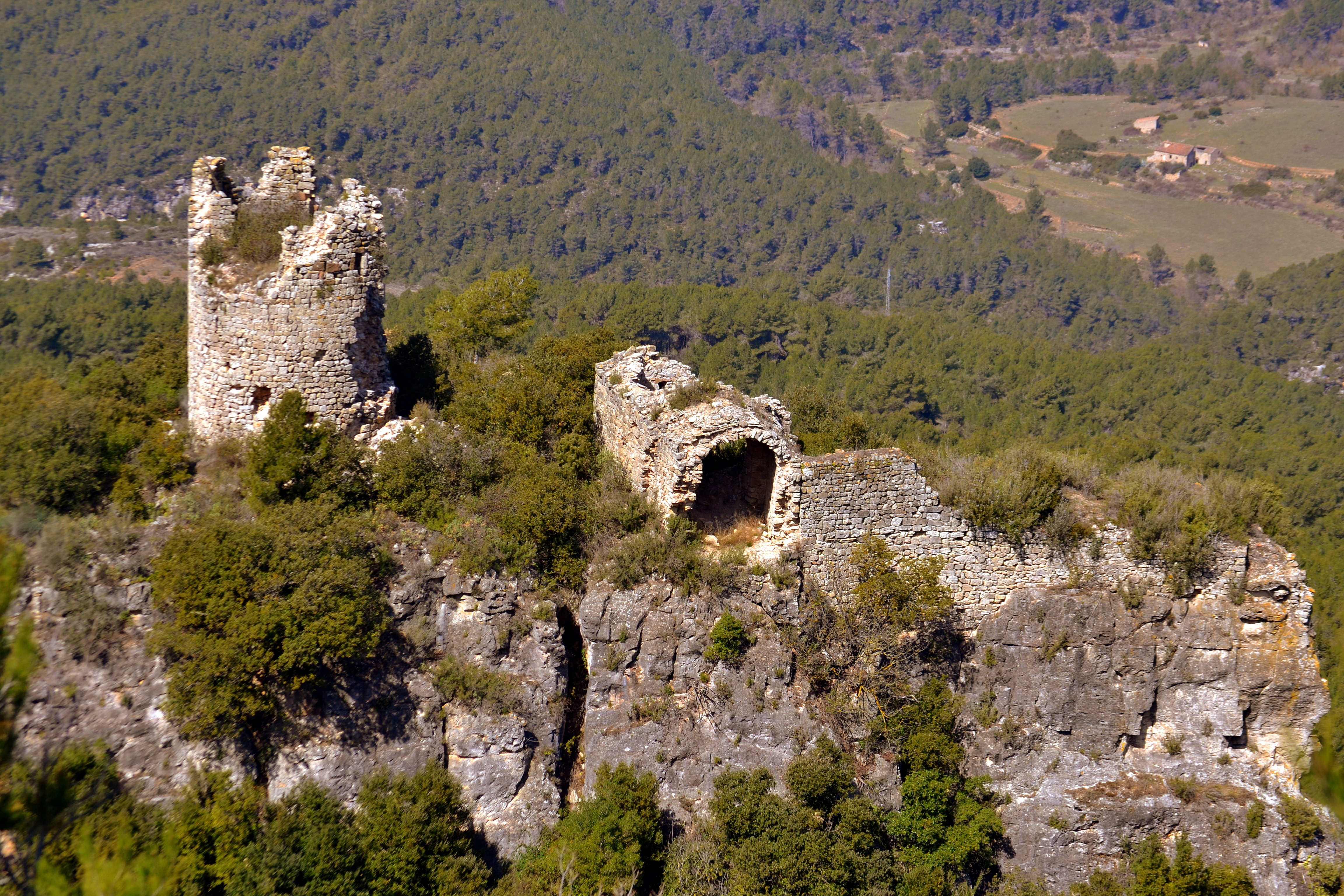 Castell de Pinyana (Querol)